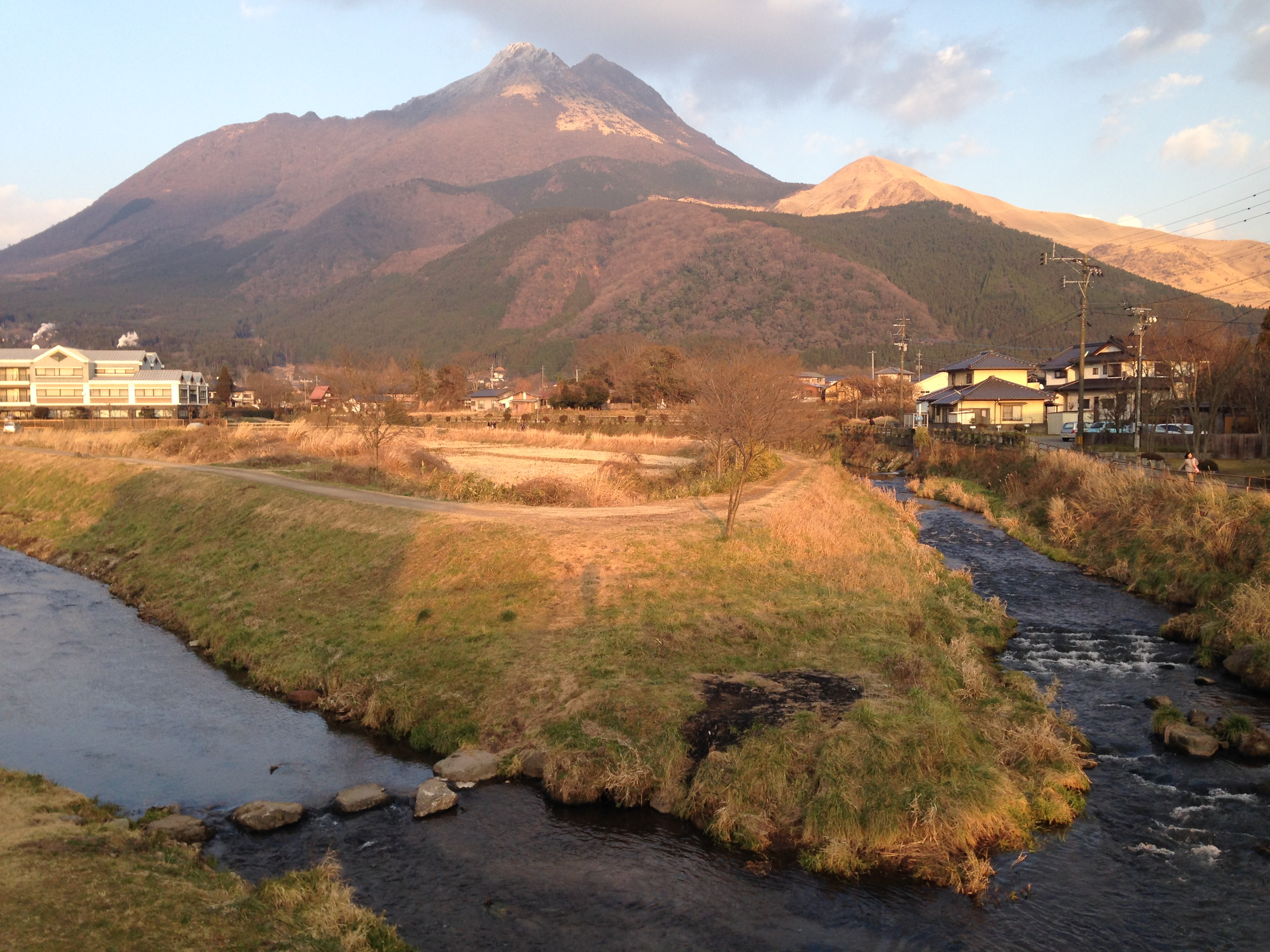 由布岳及び大分川(右)と白滝川(左)の合流点